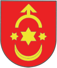 Herb miasteczka Stepań